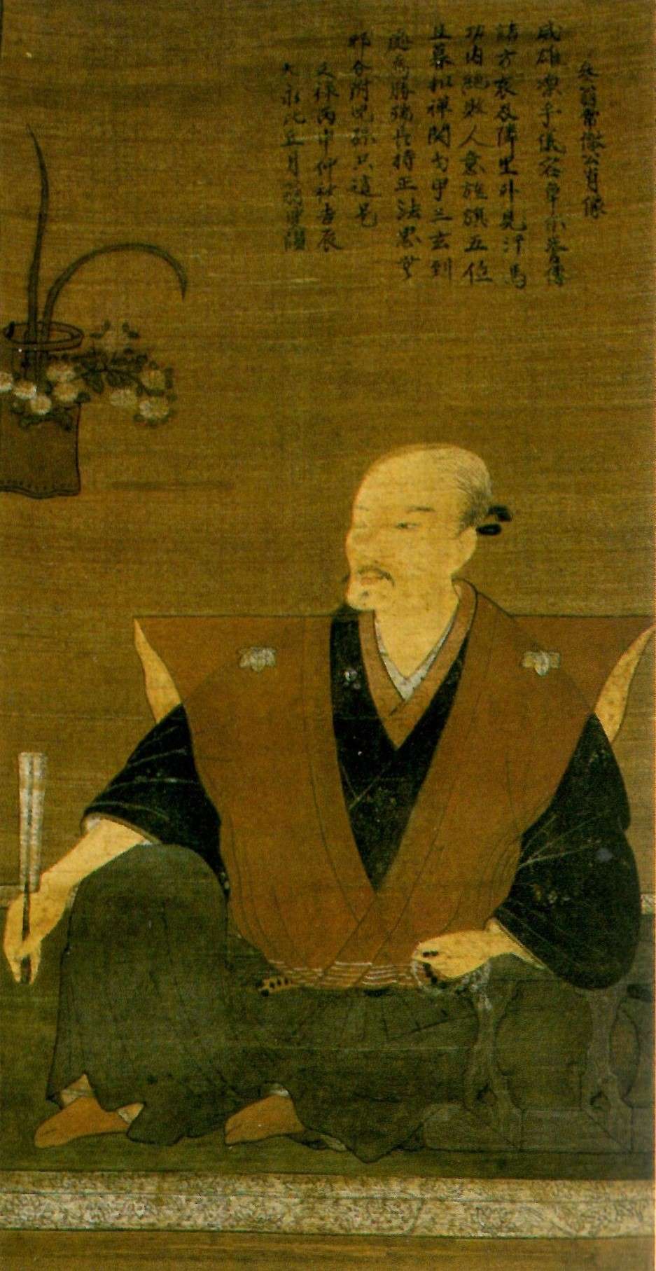 梶川高盛の肖像。